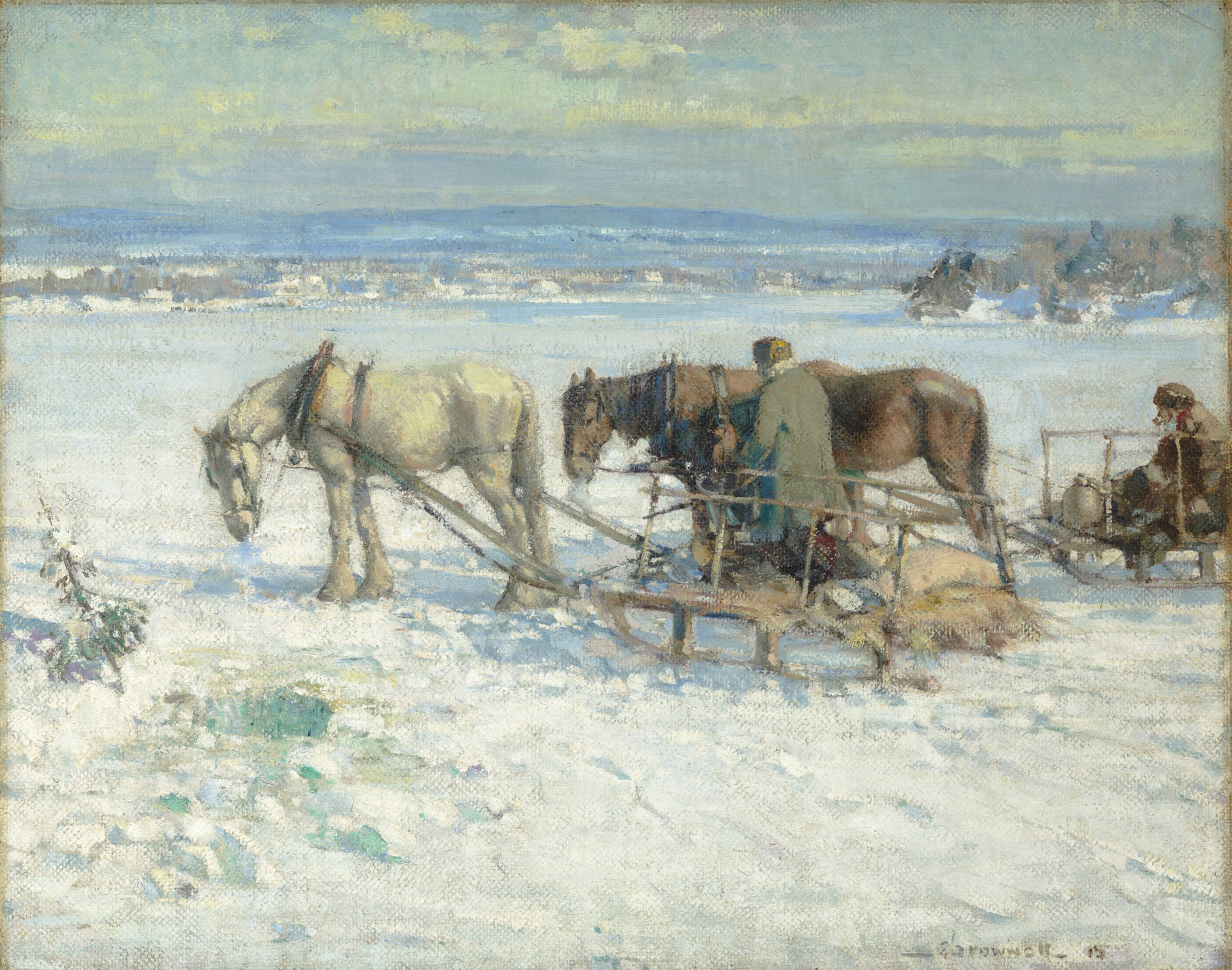 Pêche sur glace, collines de la Gatineau, Huile sur toile, 61,6 x 76,83 cm. Collection Pierre Lassonde.